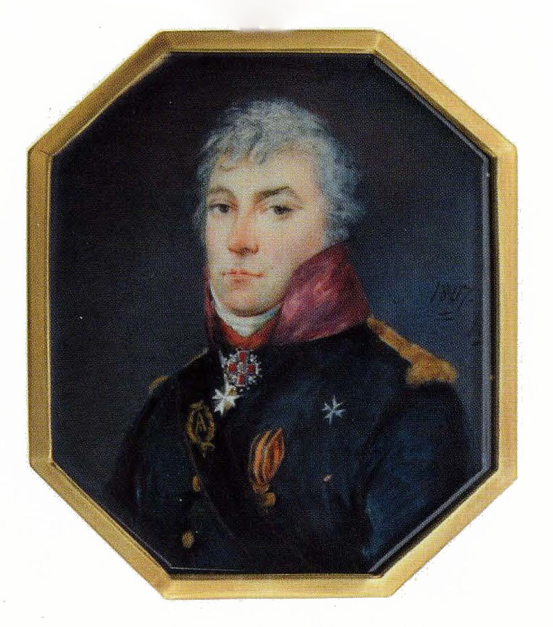 Лев Николаевич Энгельгардт (1765-1836), генерал-майор, внучатый племянник Г.Потёмкина, участник штурма Очакова.